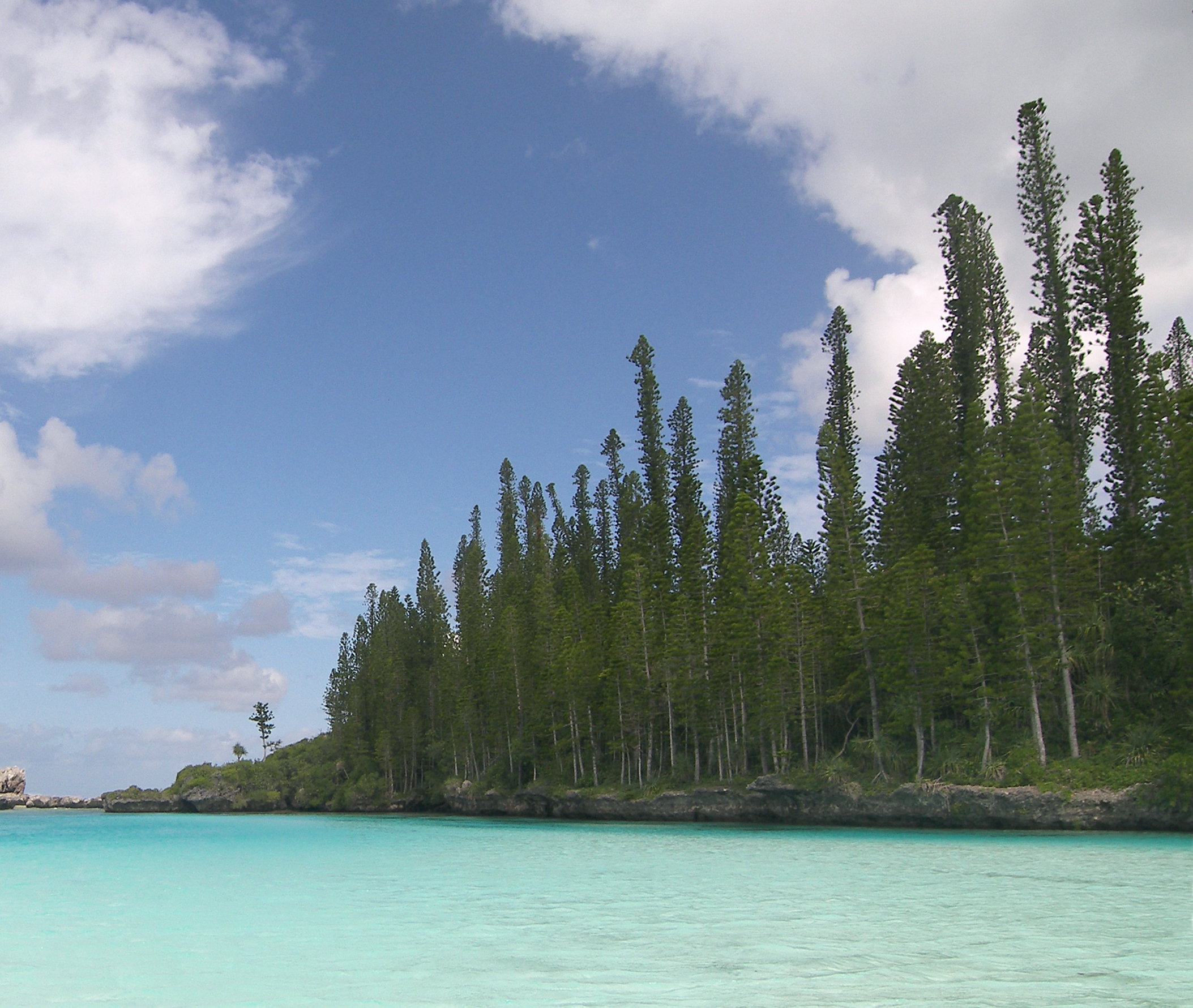 Coral Reef Araucaria Araucaria columnaris, native, L'Île-des-Pins, New Caledonia.